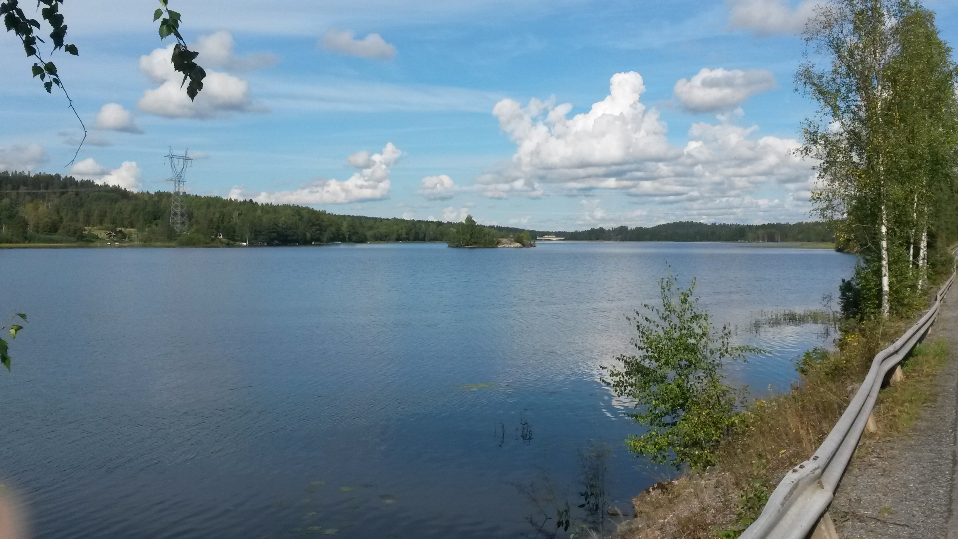 Jokisjärvi Nokian Siurolla. Näkymä pohjoiseen ja Murhasaaren sillalle